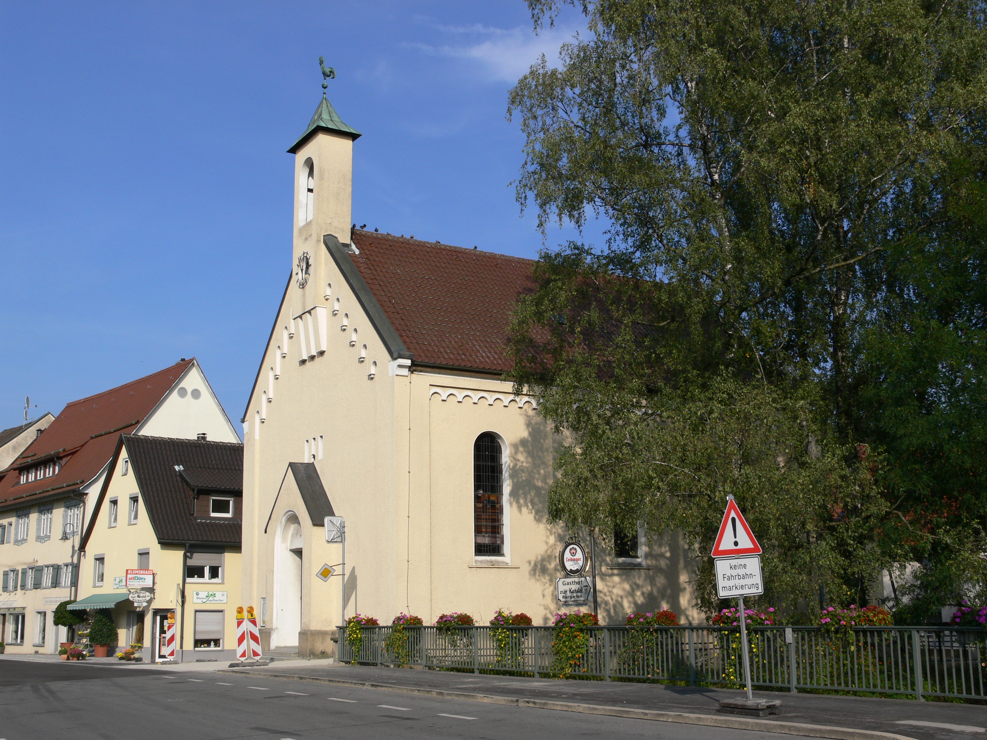 Evangelische Kirche, Baienfurt, Landkreis Ravensburg